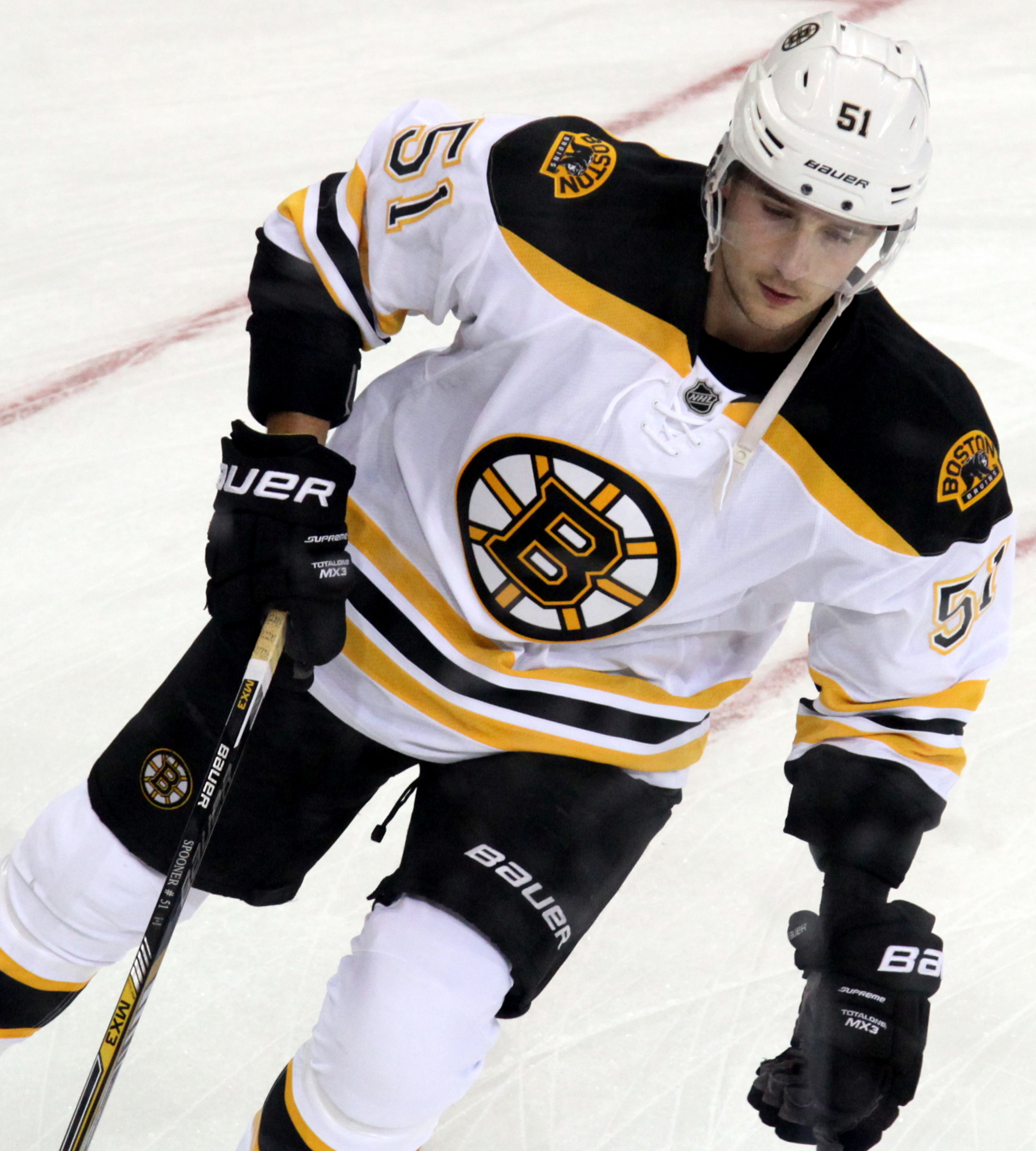 Spooner in September 2015.